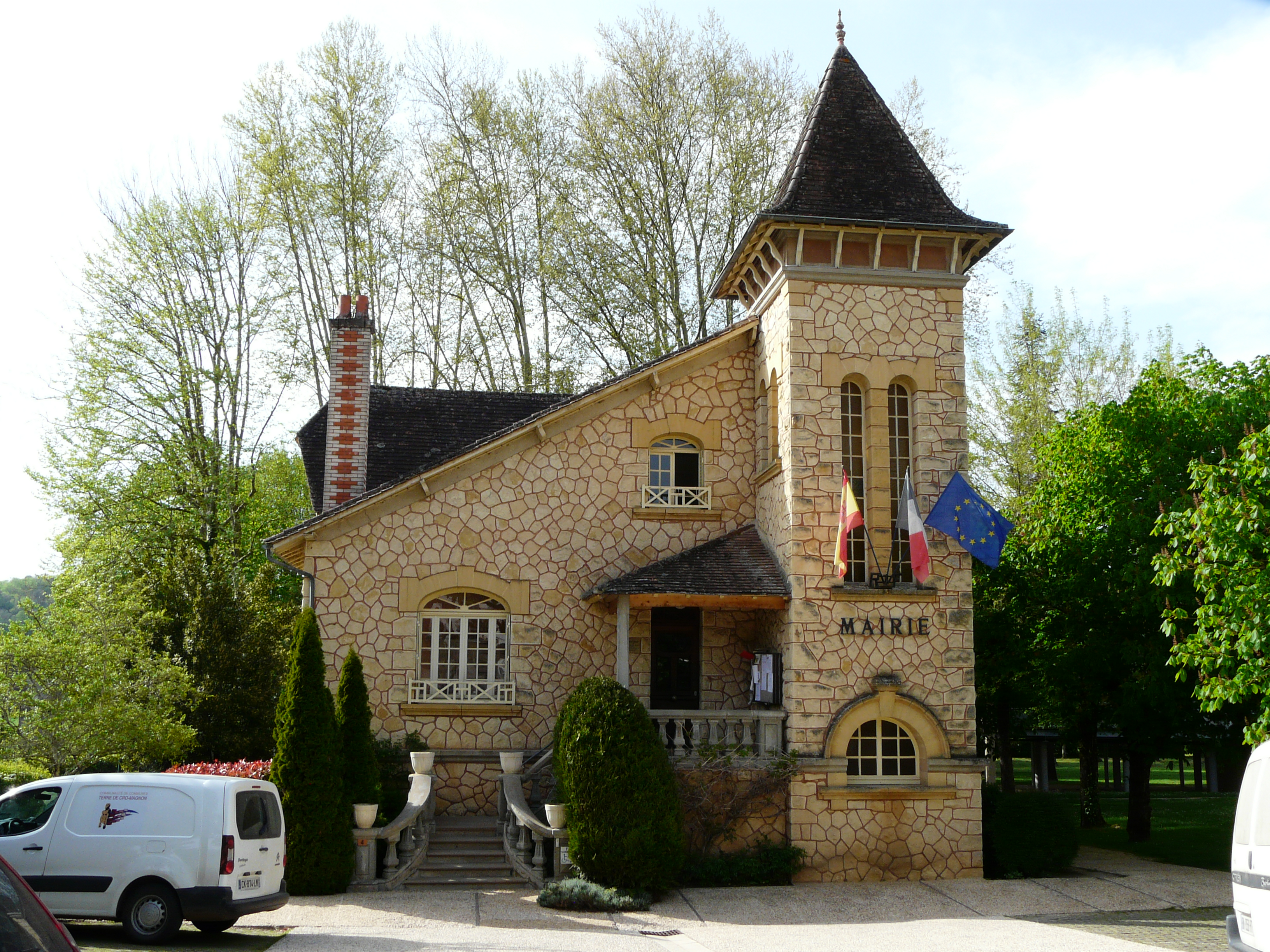 La mairie des Eyzies-de-Tayac-Sireuil, Dordogne, France.